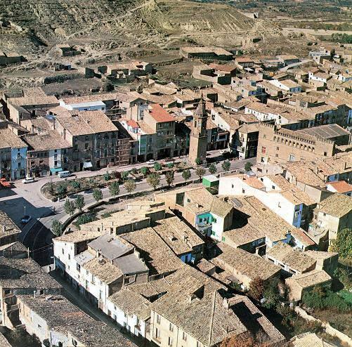 Esta foto fue realizada a finales de los años 1970 o principios de los años 1980 Ayerbe